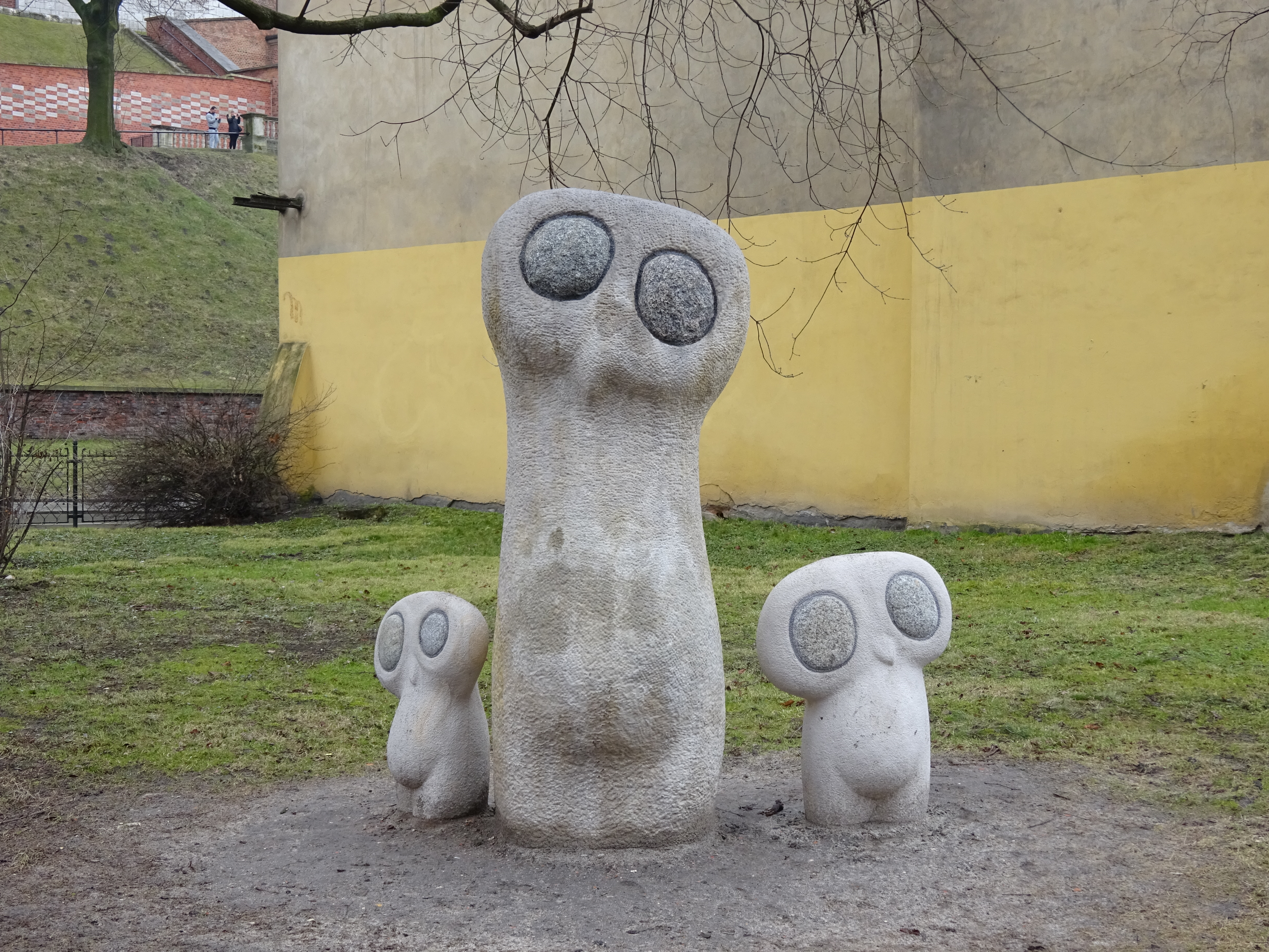 Sowy - rzeźby Bronisława Chromego na Plantach w Krakowie. Po renowacji, 2016